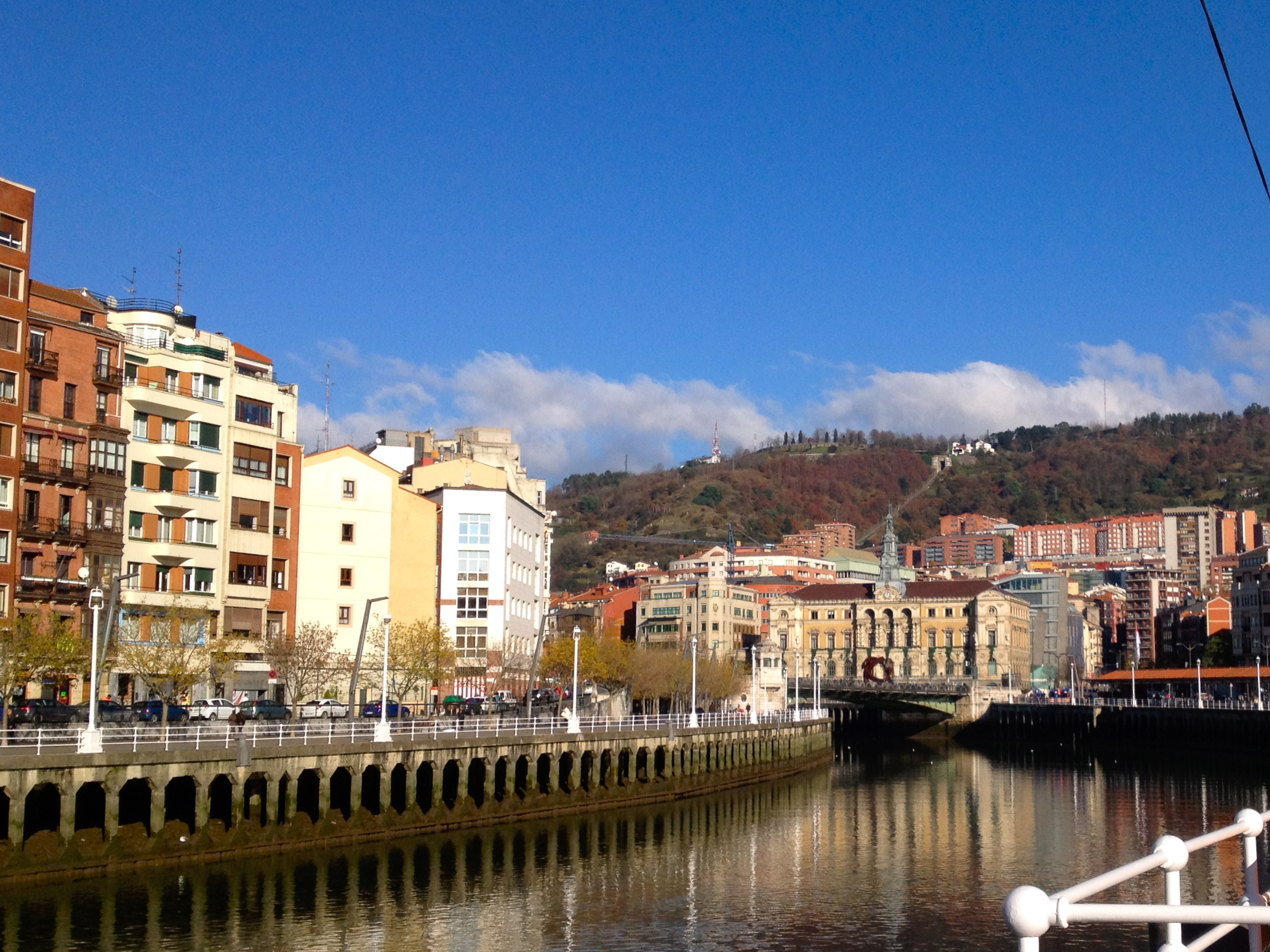 Bilbao junto a la Ría